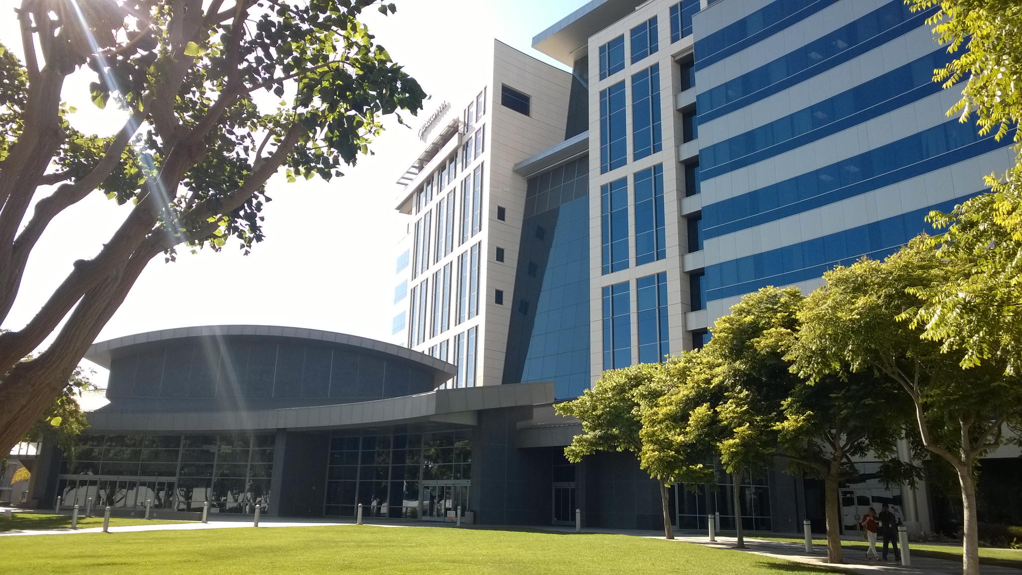 Главный офис Куалком